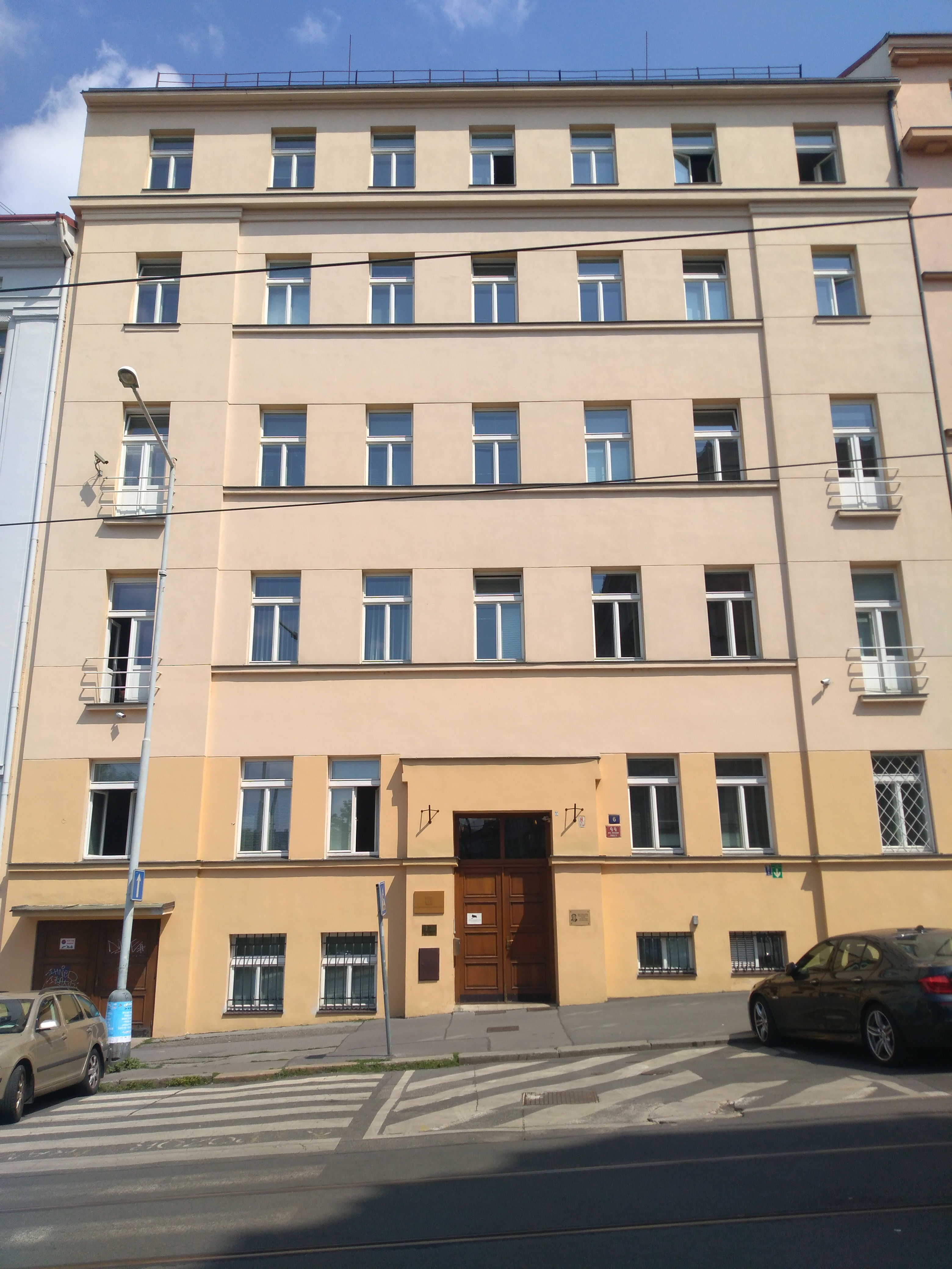 Sídlo RRTV a ústředí Konfederace politických vězňů ČR ve Škrétově ulici 44/6.